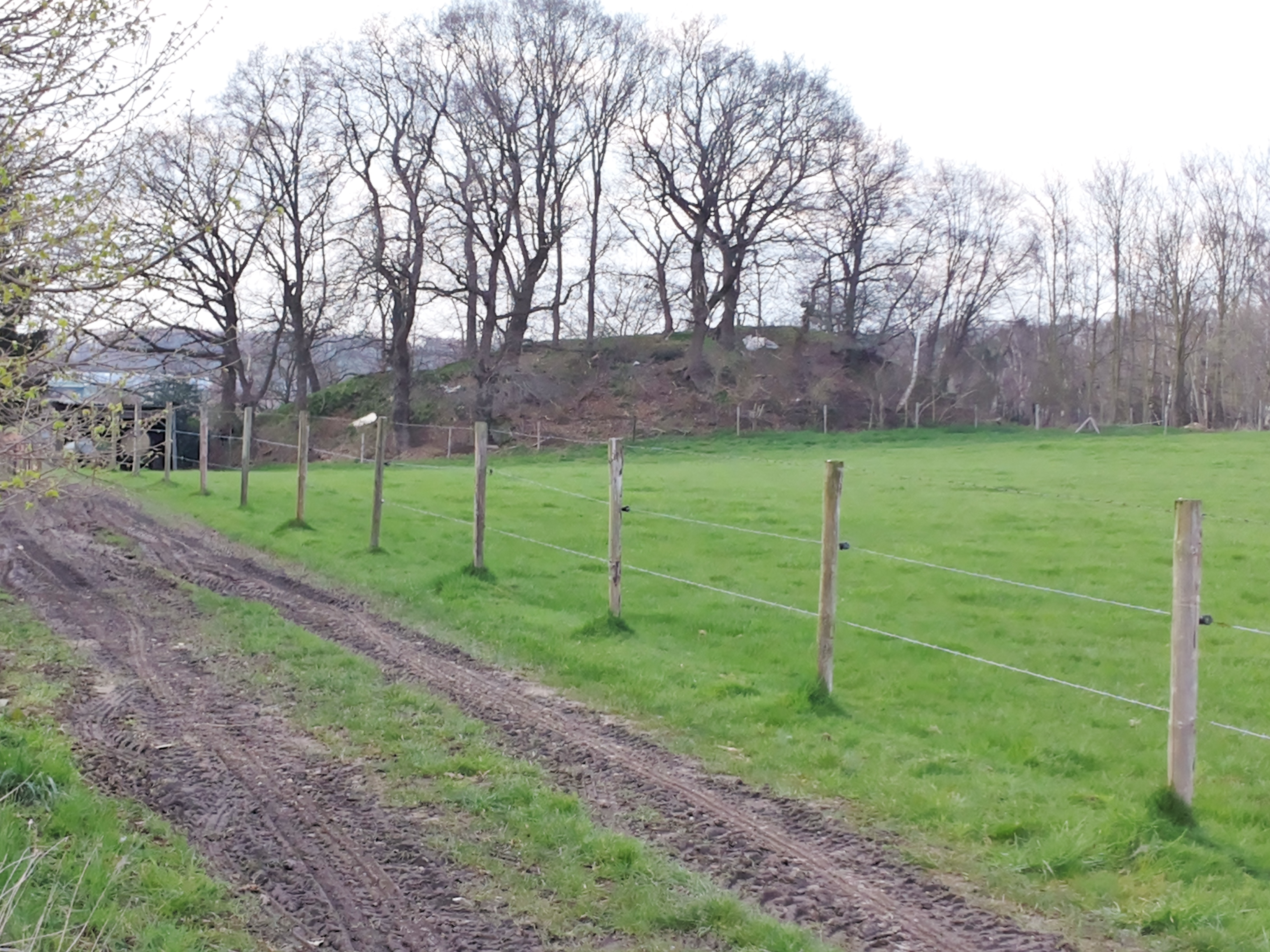 Reste der ehemaligen Motte (Burgberg) in Leiffarth, (Kulturdenkmal)